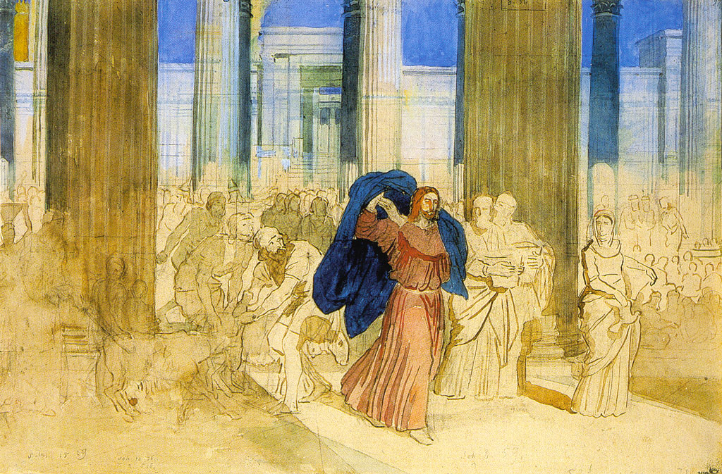 Изгнание торгующих из храма